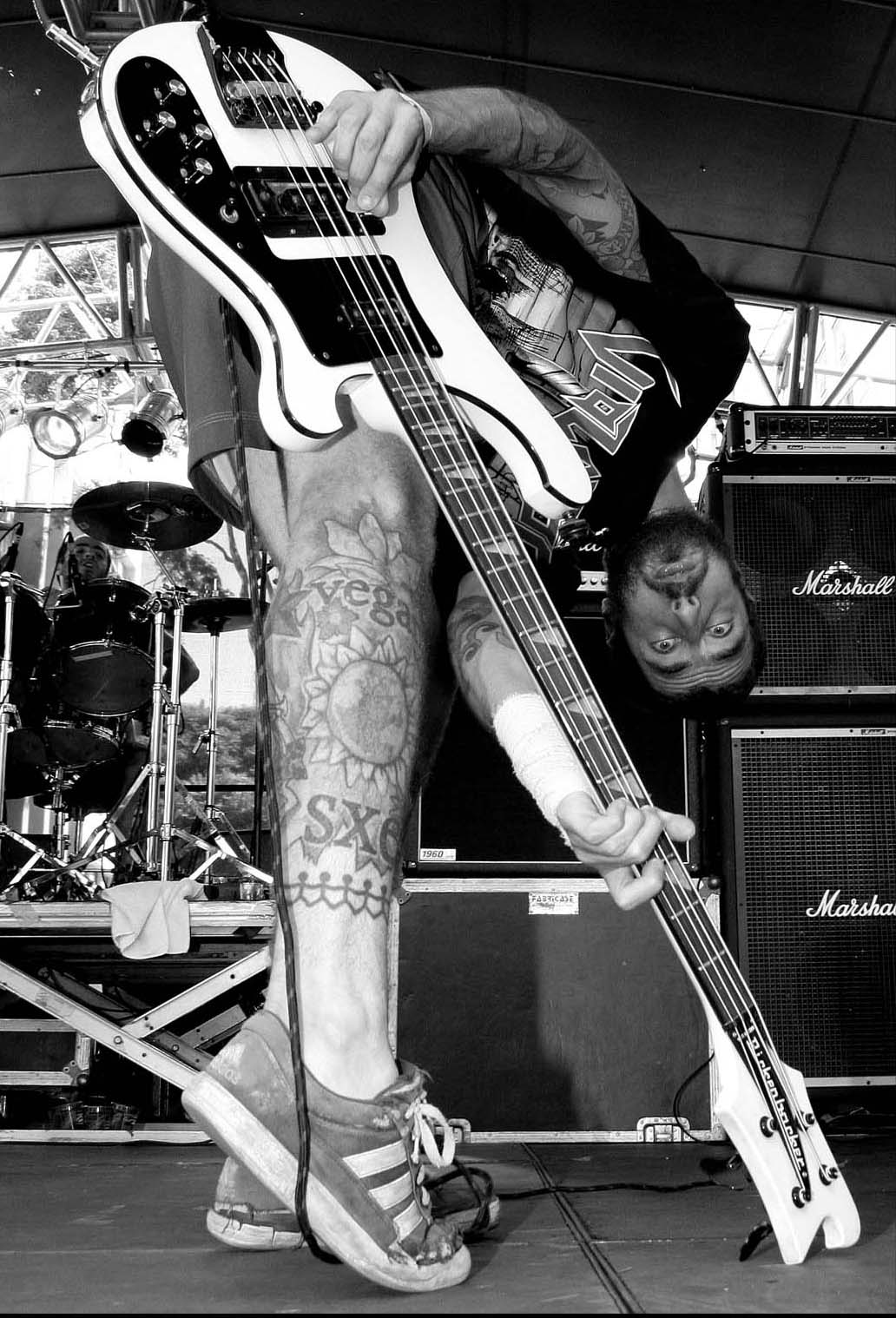 Ratos de Porão no evento Virada Cultural, 2007.